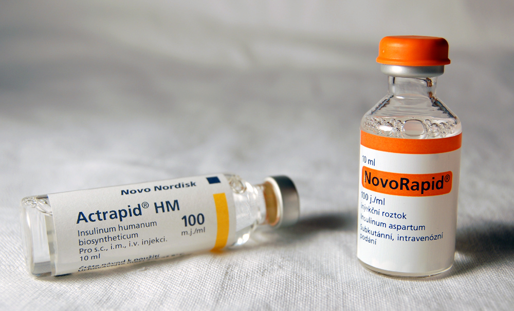 Ampule inzulínu Actrapid (pro užití inzulínkou) a Novorapid (pro užití do IP) od firmy NovoNordisk